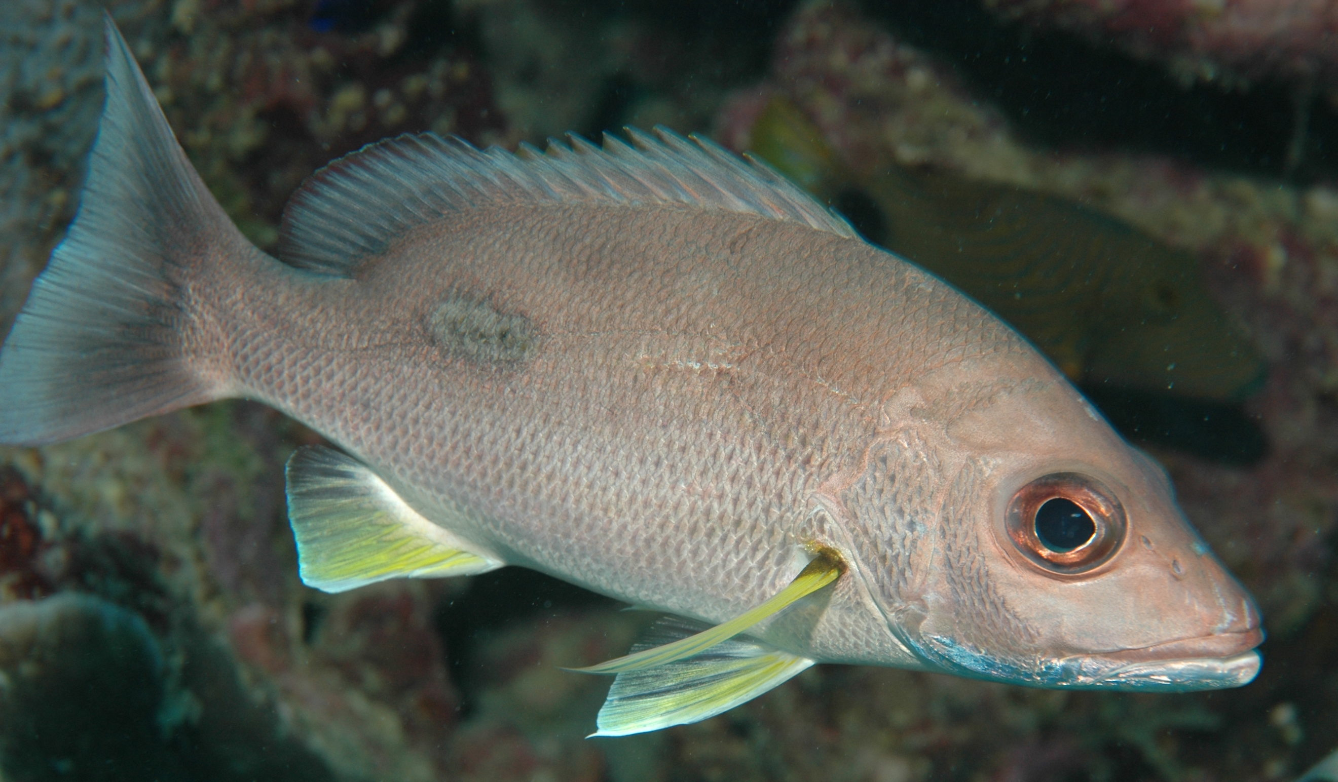 Lethrinus harak ?? or Lutjanus monostigma (Lutjanidae)